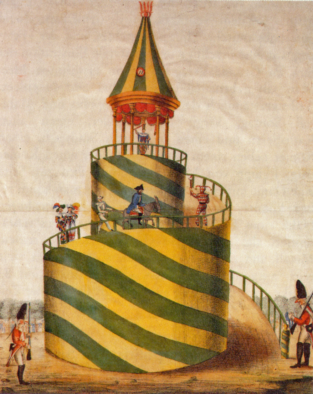 Der babylonische Turm, aus der Serie zum Maskenzug 1828, einem der ersten Kölner Karnevalsumzüge